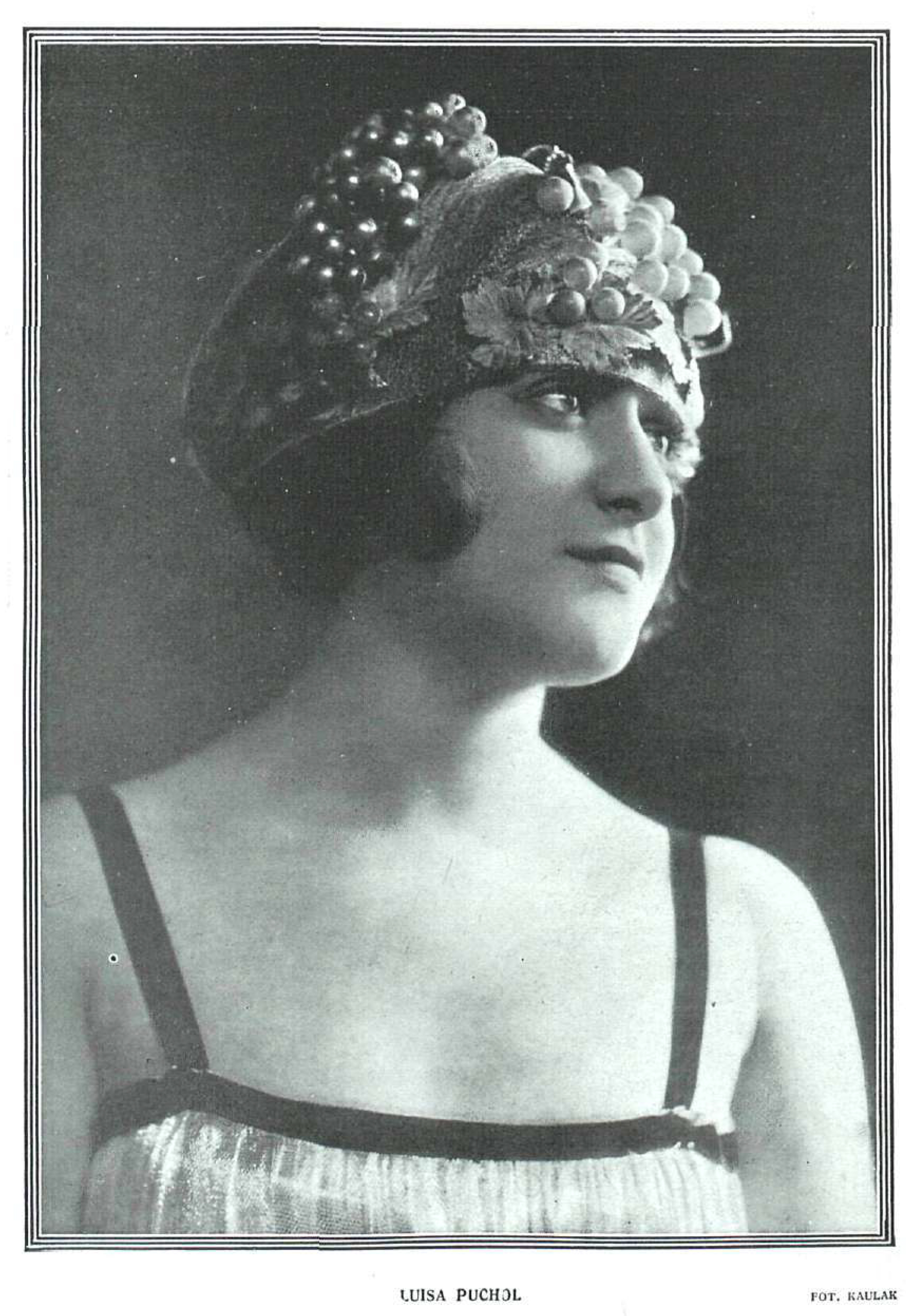 Rosalima, notabilísima y aplaudida canzonetista.